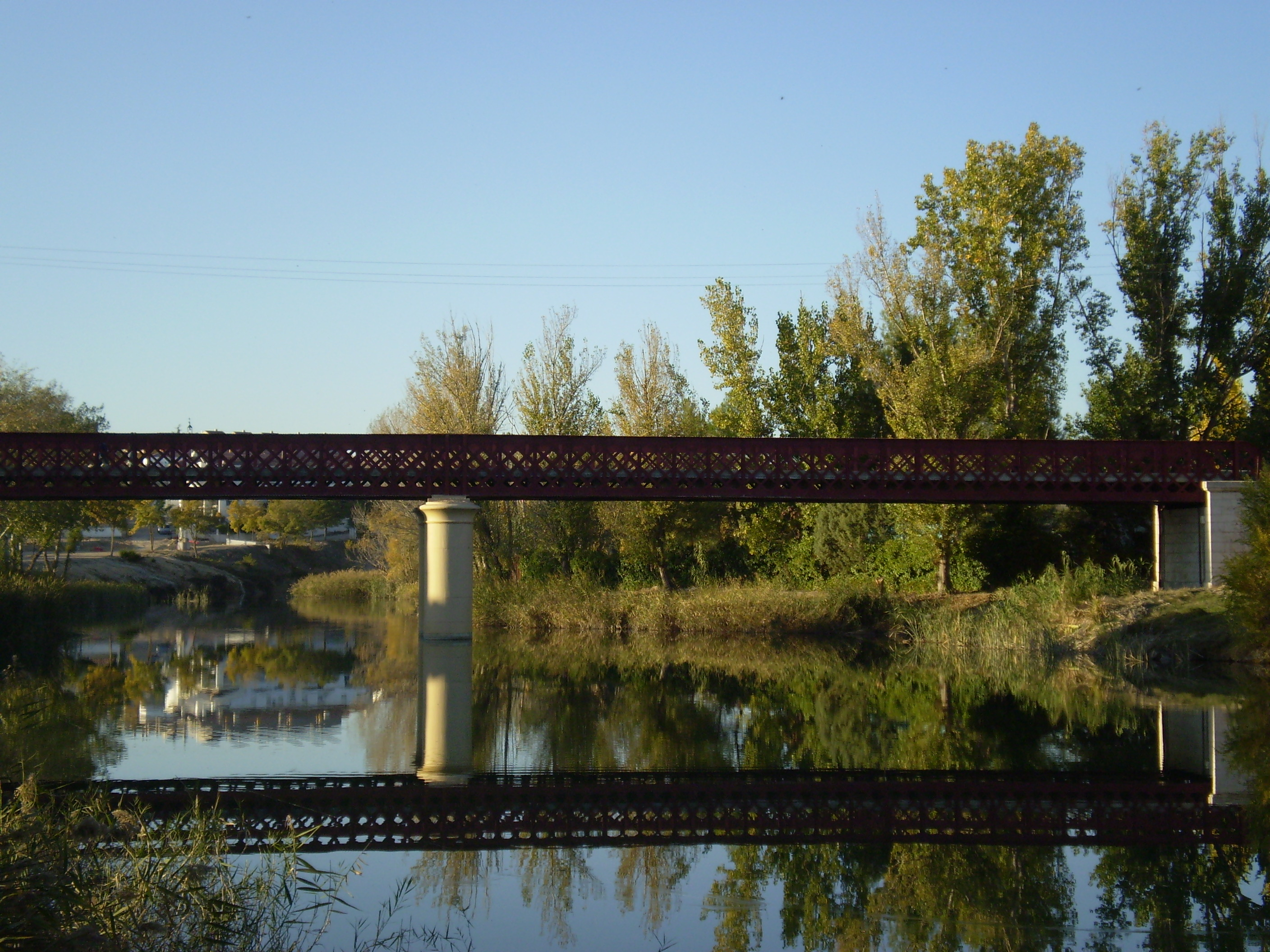 Fuentidueña Bridge over Tajo River. Fuentidueña de Tajo, Community of Madrid, Spain